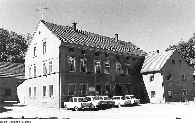 Original image description from the Deutsche Fotothek Löbau-Ebersdorf. Ehem. Walkmühle